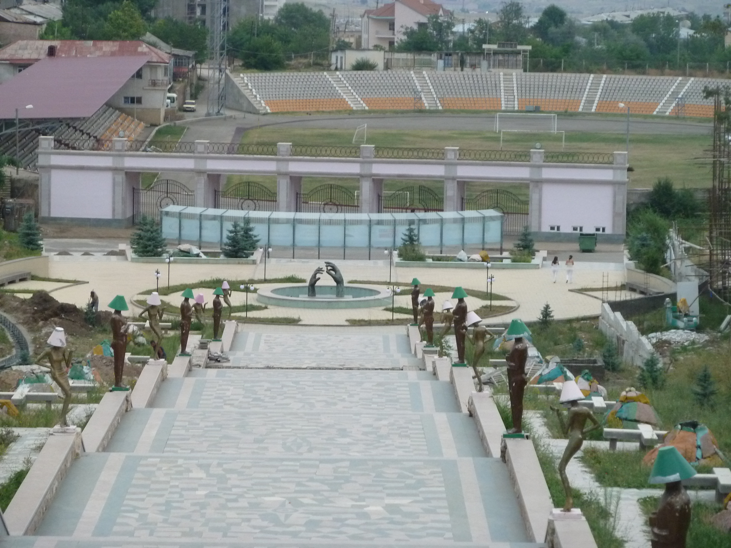 Аллея влюбленных